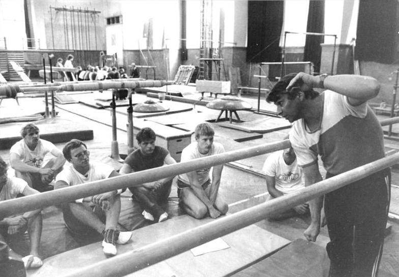 ADN-ZB-Kluge-19.10.85-re- Leipzig: Serie zum 35jährigen Bestehen der DHfK- "Leichtathletik-Studenten" des 2. Studienjahres während der Grundausbildung Geräteturnen. Ehemalige bekannte Leistungssportler wie Olympiasieger Klaus Köste (im Foto) und Siegfried Fülle gehören zu den Lehrkräften im Gertäteturnen.